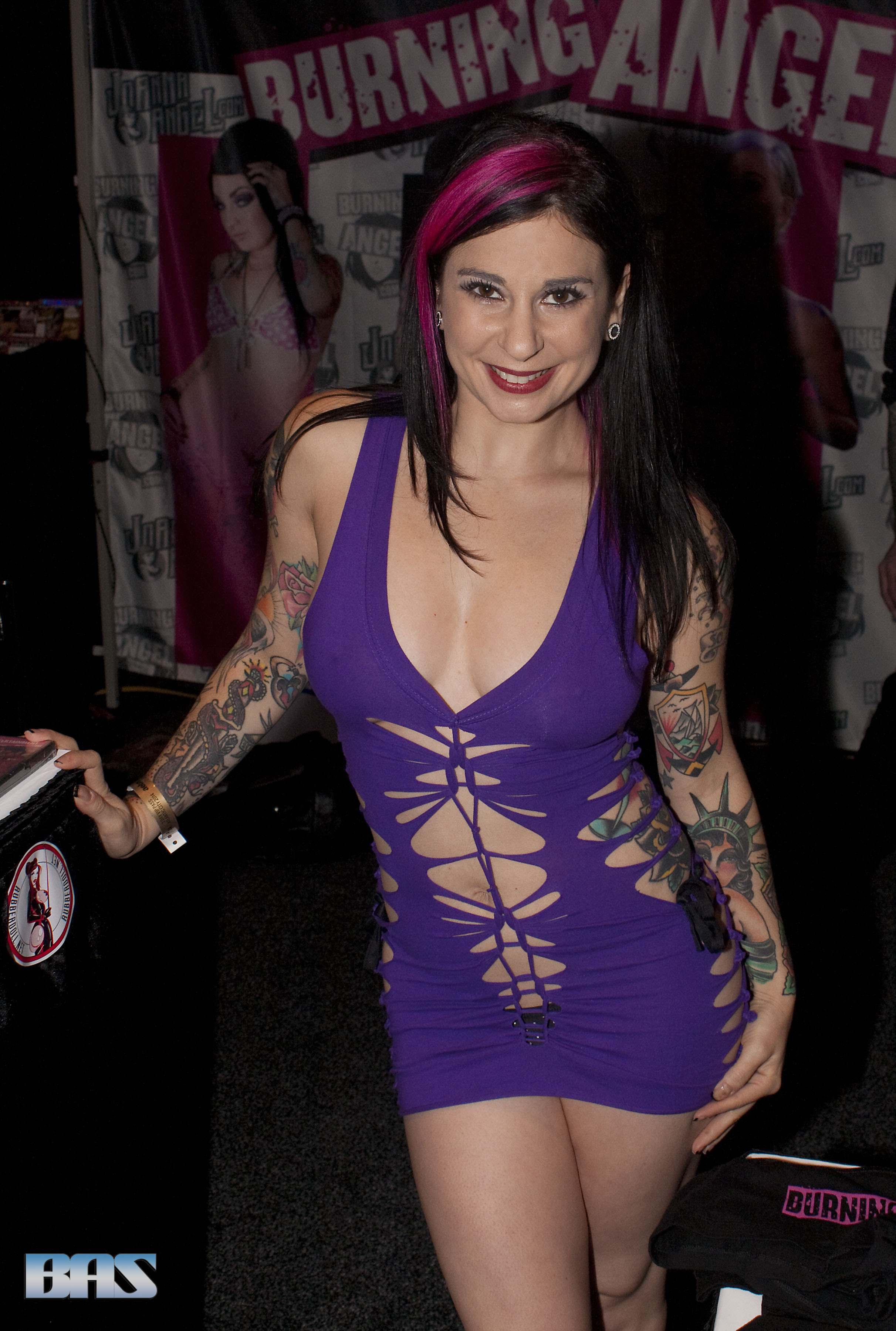 ExxxAC2014_161bas